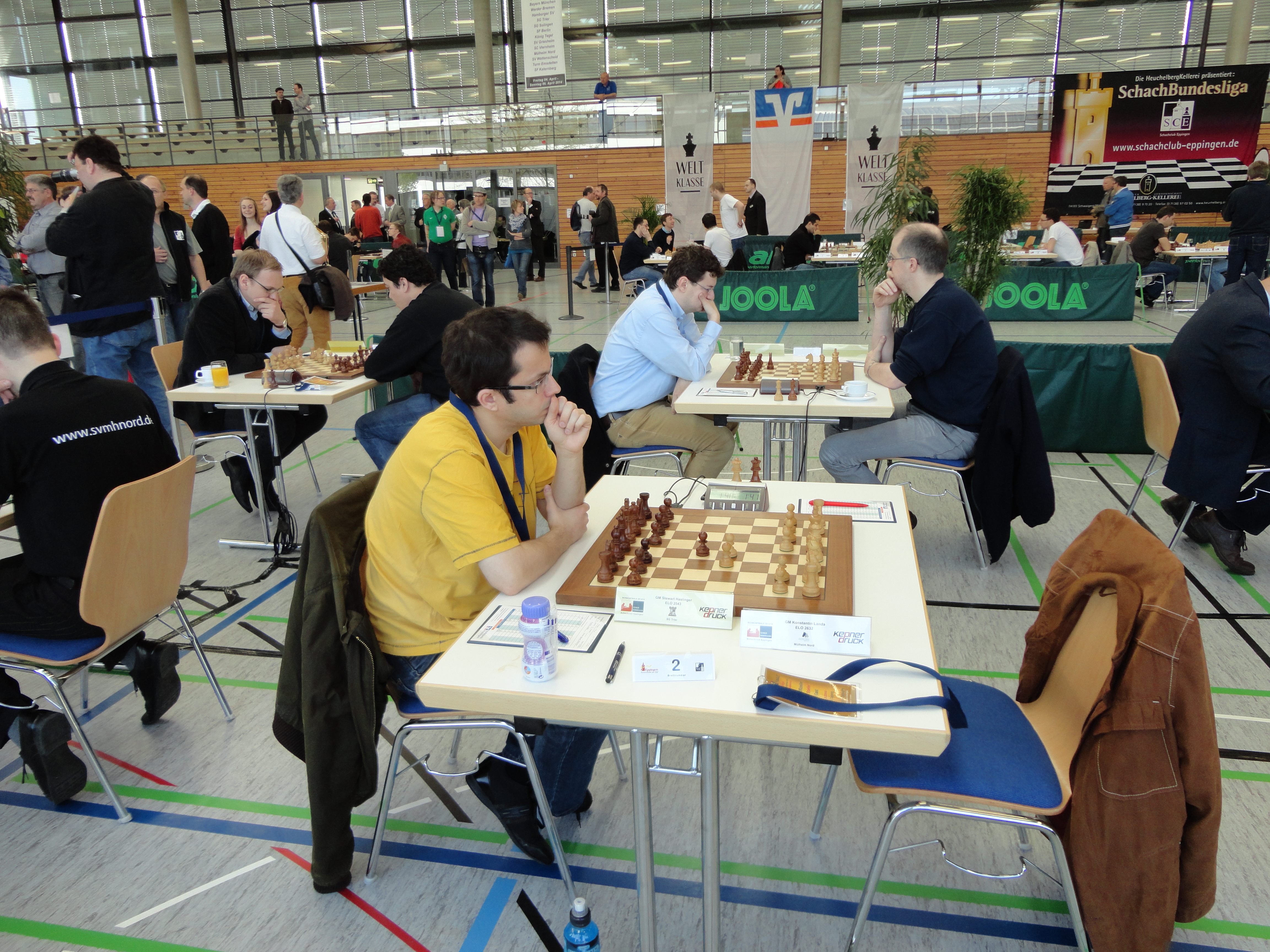 Im Vordergrund: Stewart Haslinger beim Spiel gegen Konstantin Landa, Finale der Deutschen Schachbundesliga Saison 2013/2014 in der Hardwaldhalle Eppingen.